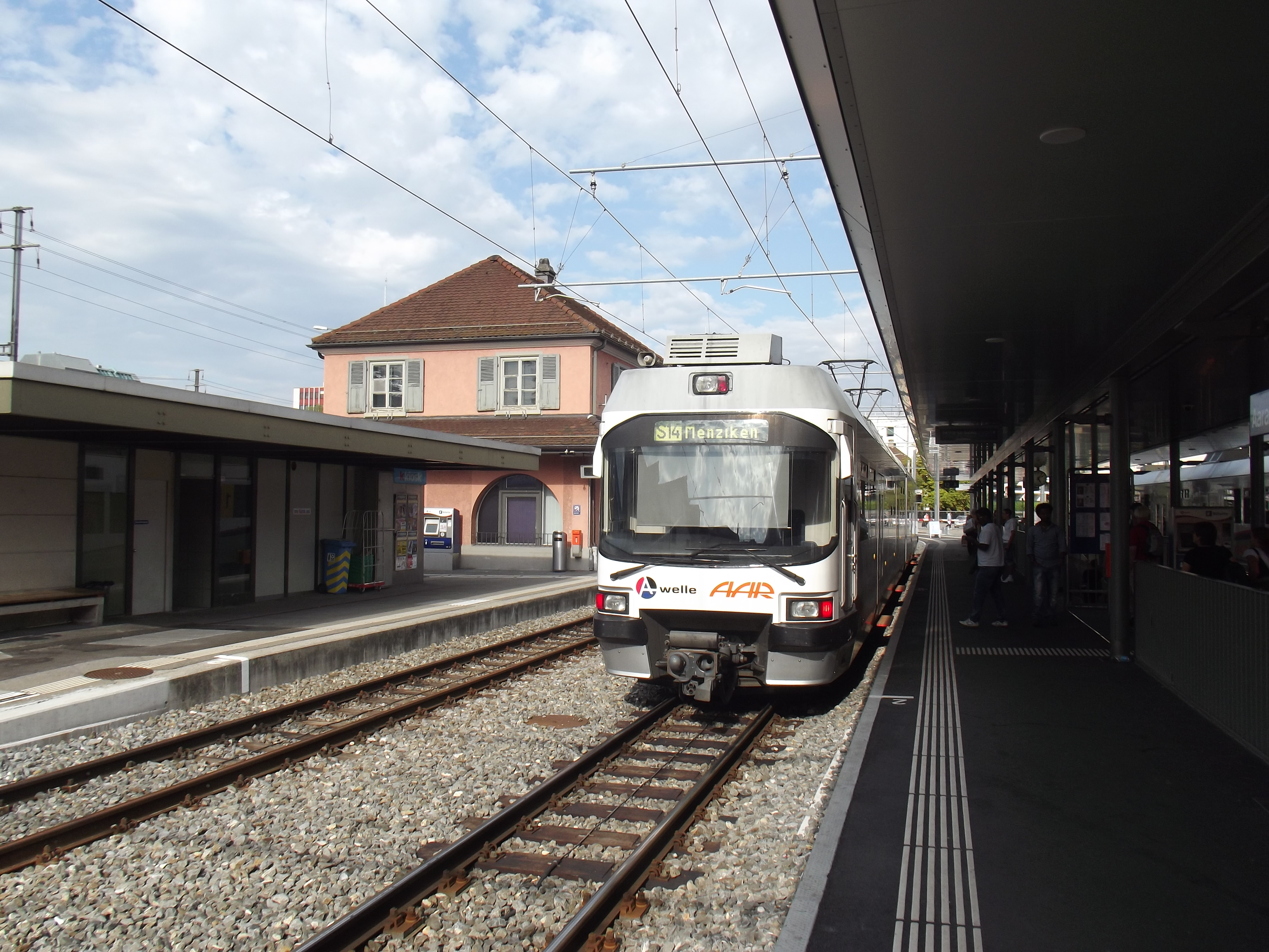 Doorgaande trein van de Wynental- und Suhrentalbahn in Aarau.